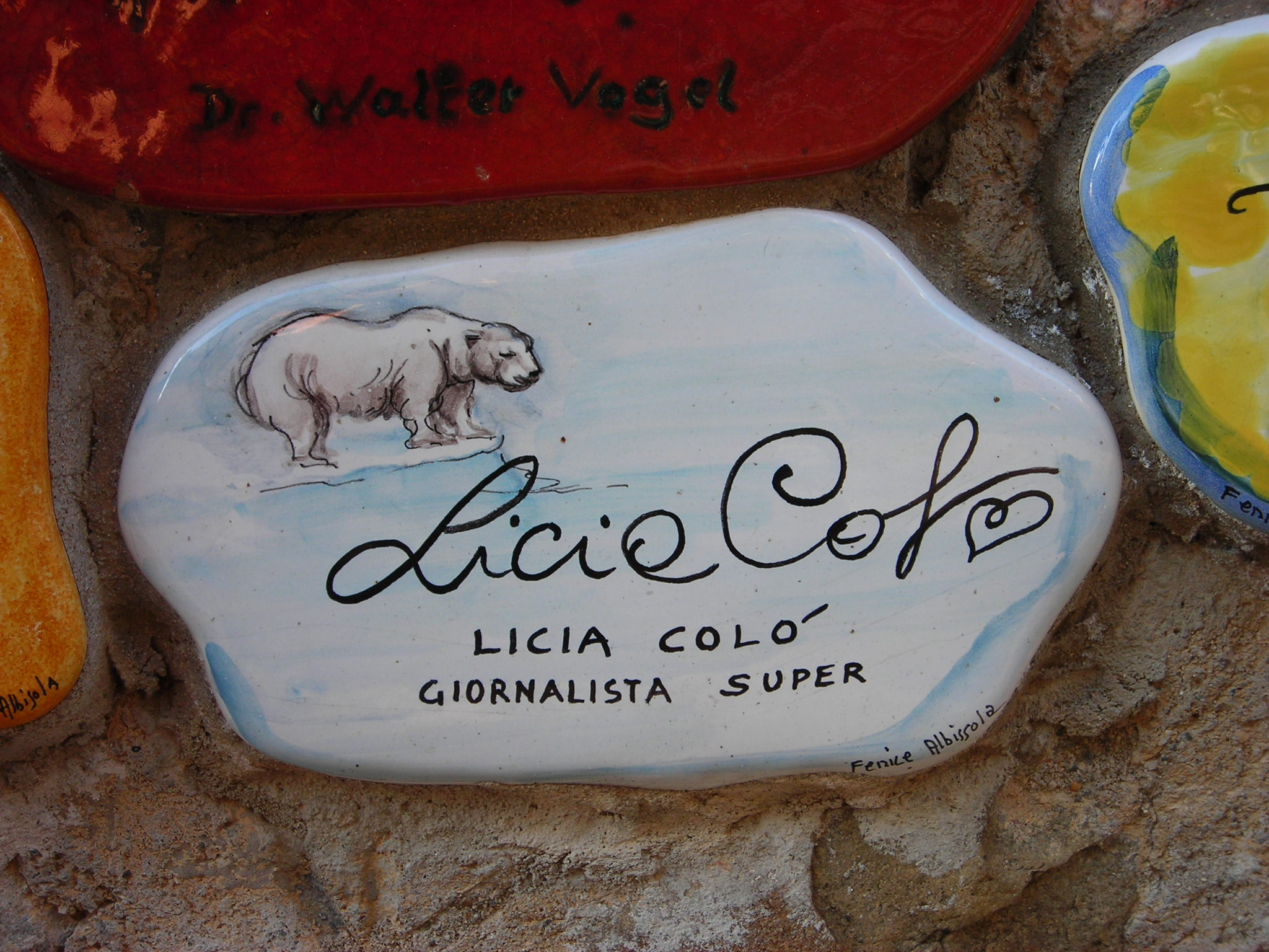 Piastrella del Muretto di Alassio autografata da Licia Colò